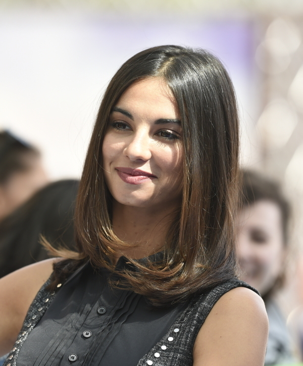 Francesca Chillemi, Giffoni Experience, 24 luglio 2015.